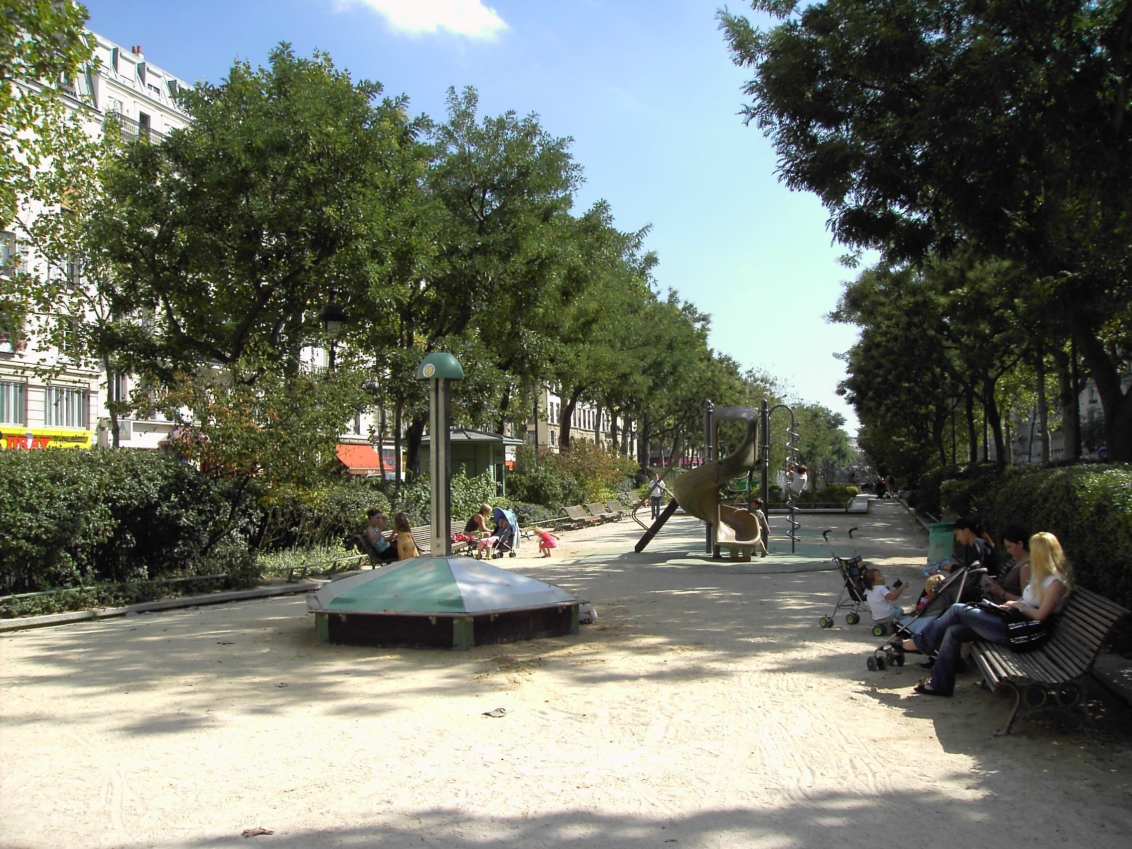 Paris, Canal St Martin: sur la couverture